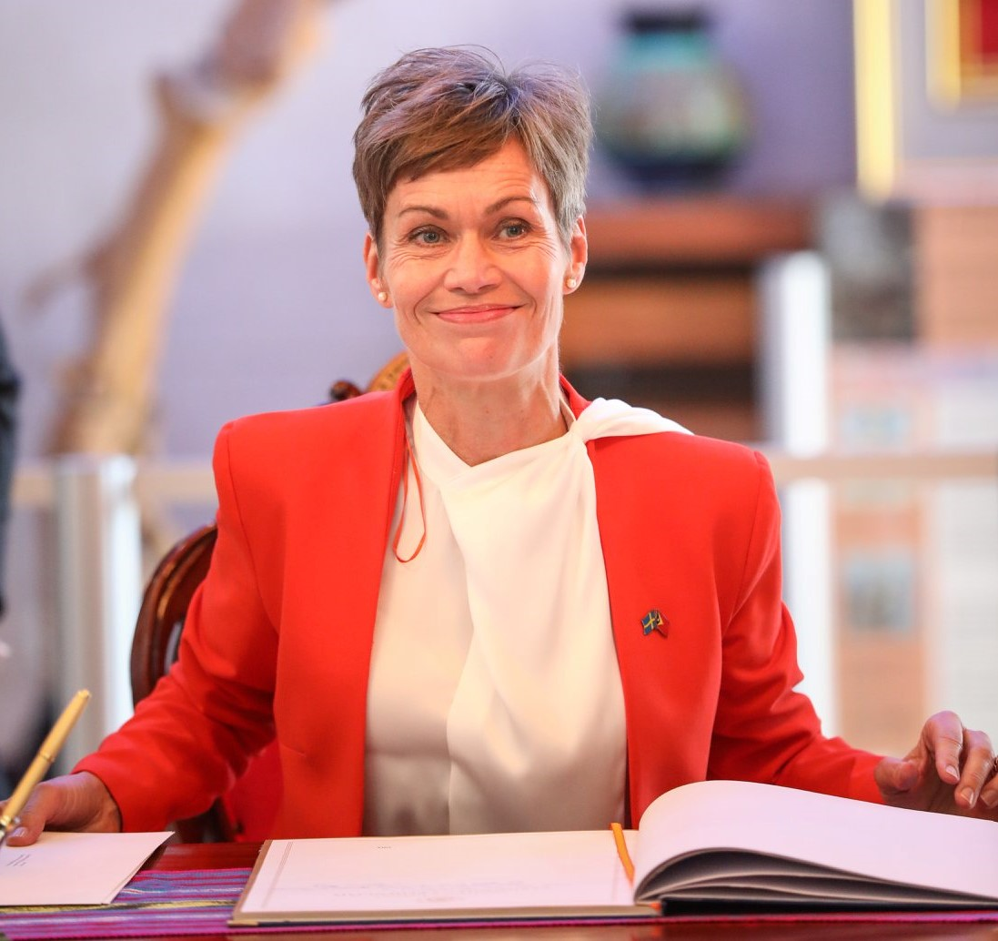 Die schwedische Botschafterin Marina Berg übergibt ihre Akkreditierung an Osttimors Präsident Francisco Guterres